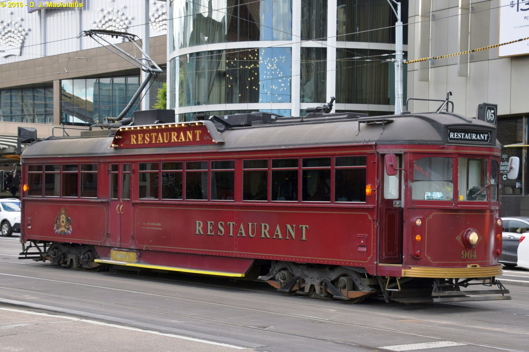 Tram 964 - RT 05 - 31/08/2016